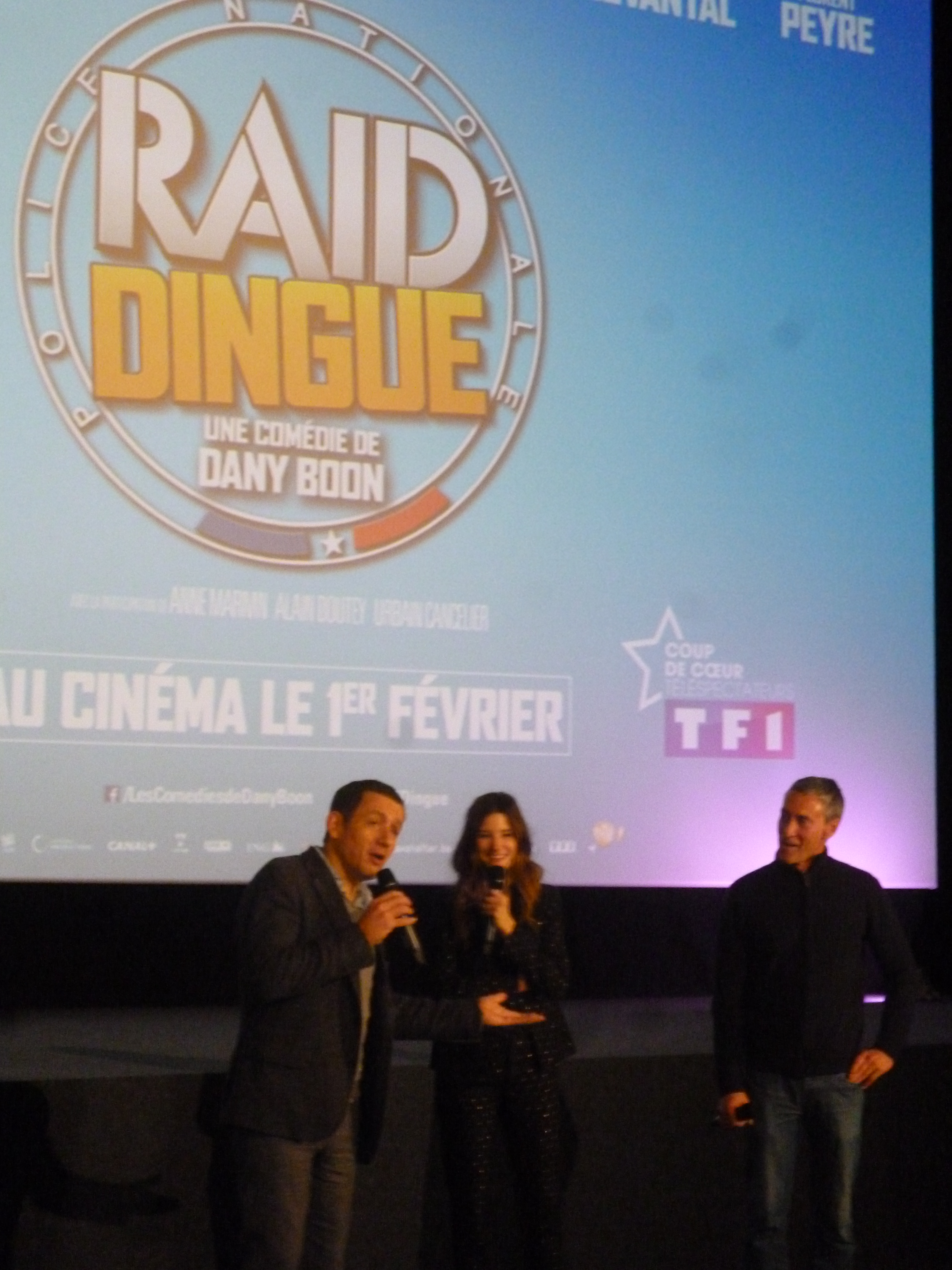 Dany Boon, Alice Pol et François Levantal présentant le film "Raid Dingue" de Dany Boon, le mercredi 25 janvier à Beauvais (Oise).